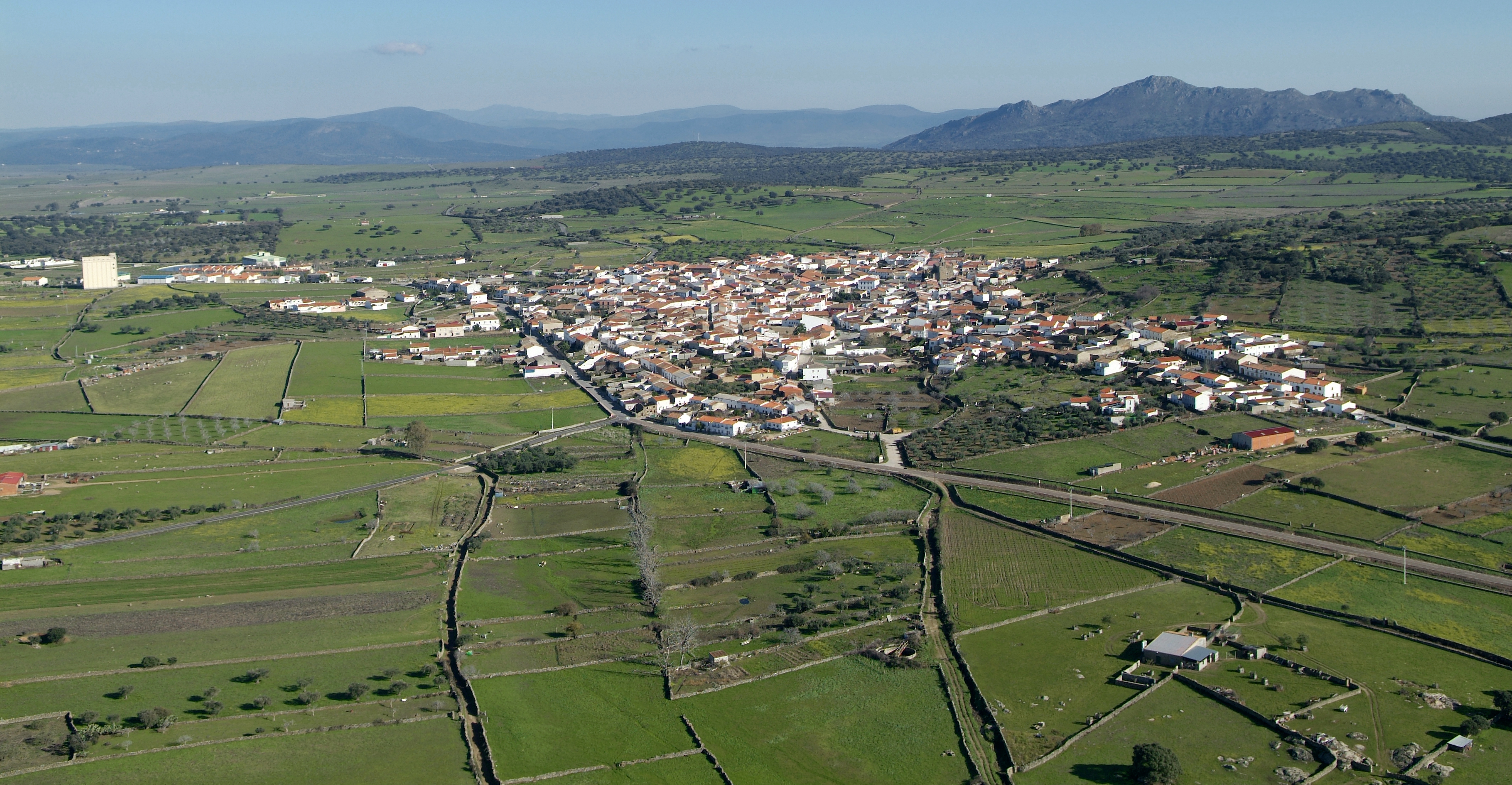 Vista aérea